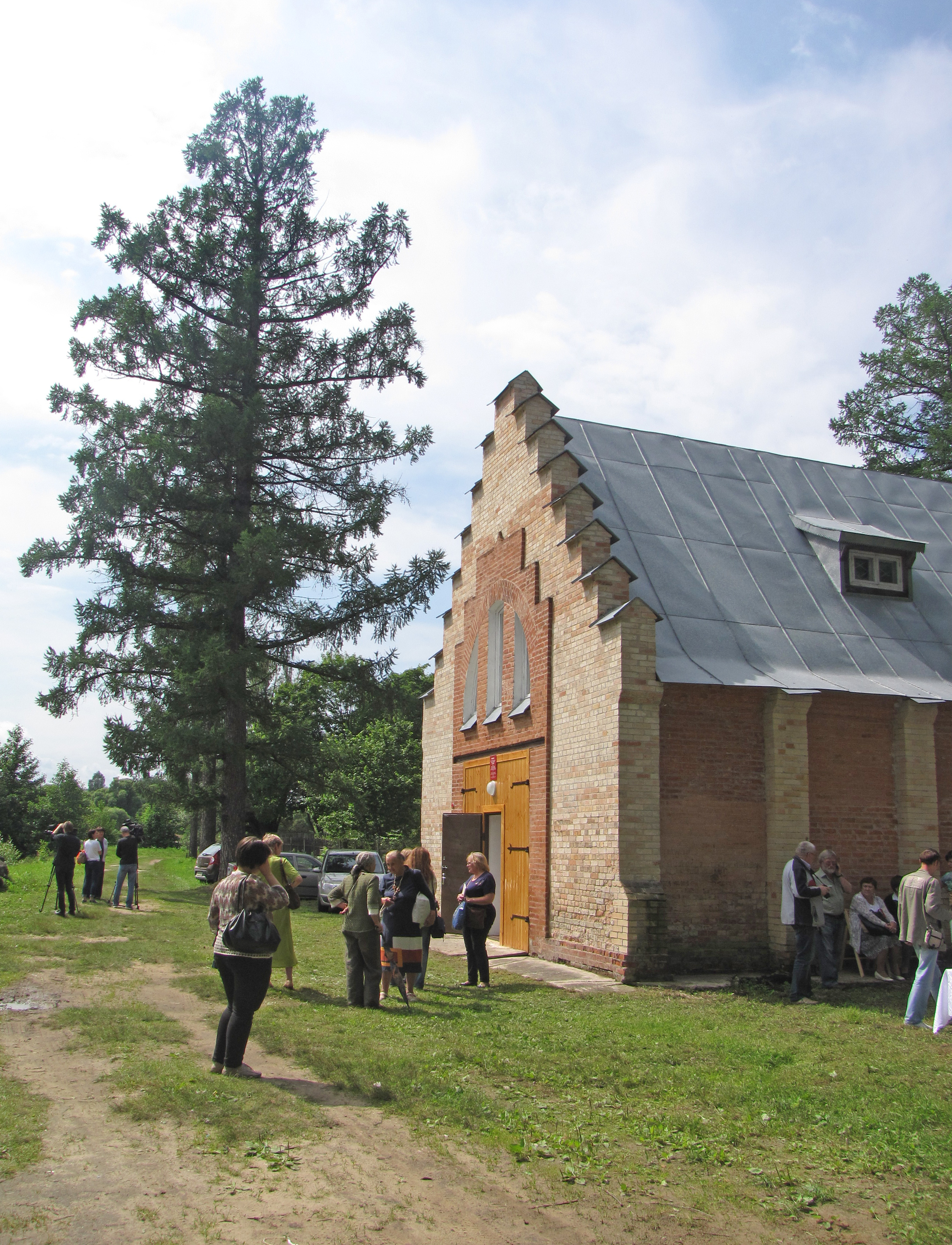 официальное открытие первой музейной выставки «Усадьба Муромцево: между минувшим и грядущим» в отреставрированном здании бывшего лодочного павильона на берегу Барских прудов.